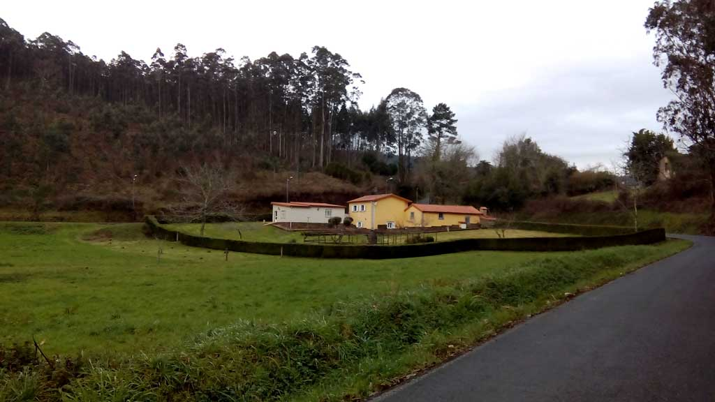 Vista da Gaiba, Doso, Narón.